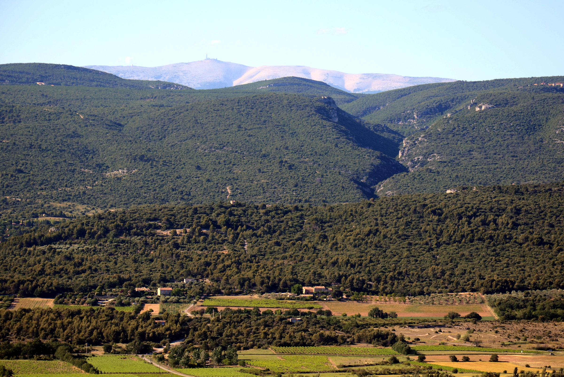 Gipfel des Mont Ventoux von Roussillon aus gesehen. Im Vordergrund Berge des Luberon.